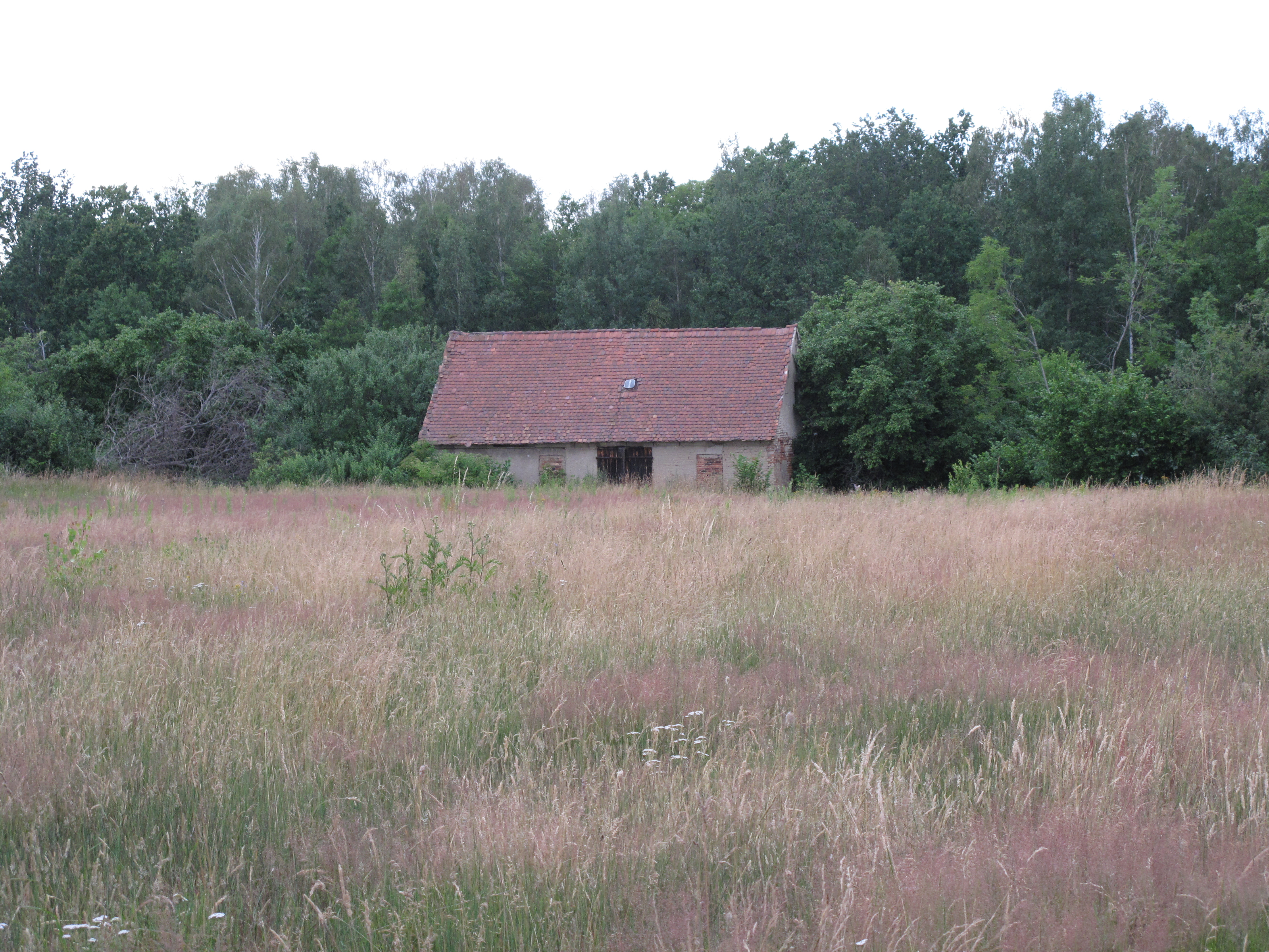 Jabłoniec (województwo dolnośląskie). Polska.